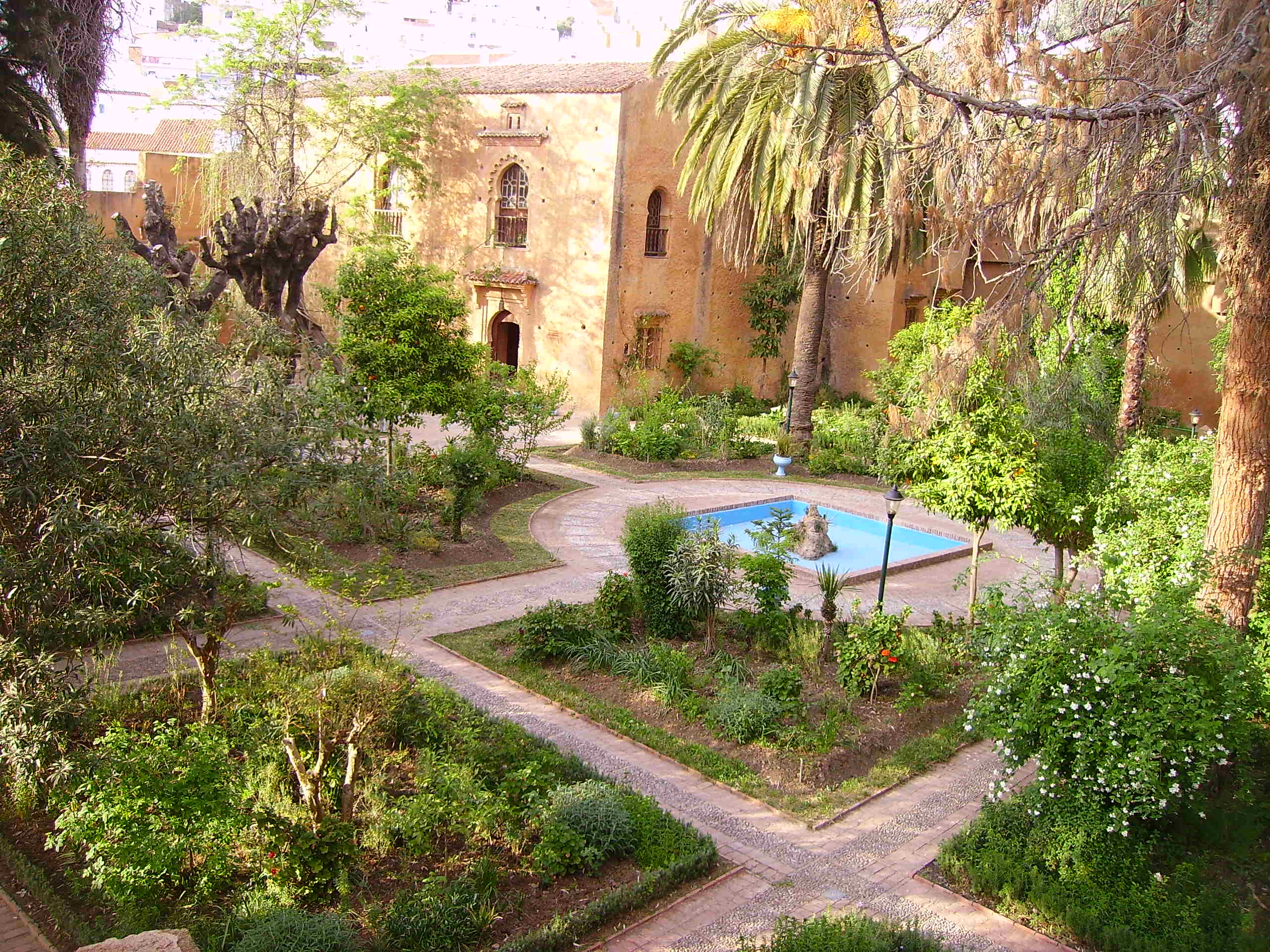 Les jardins de l'intérieur de la Kasba de Chefchaouen.